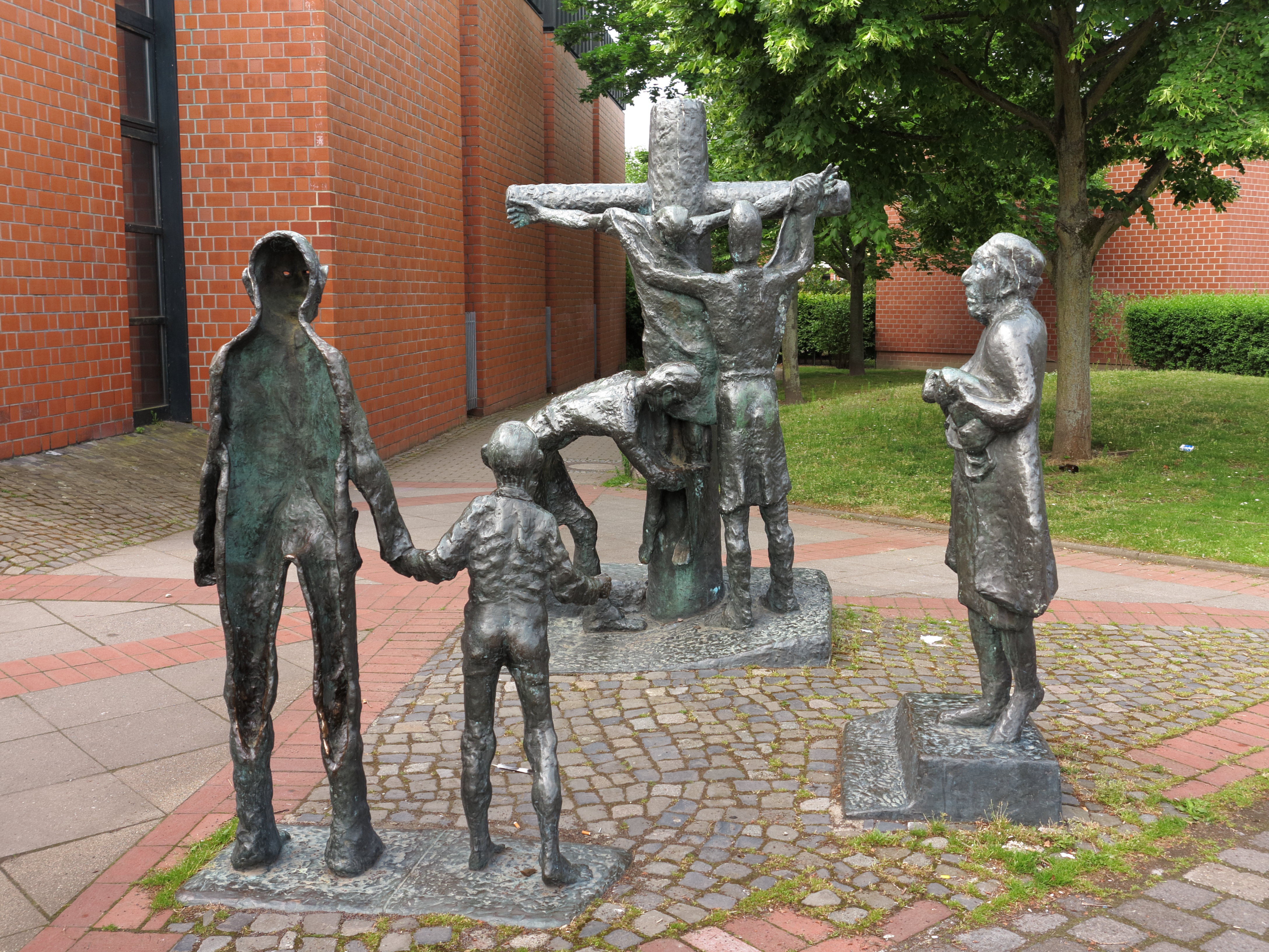 Die Skulptur "Kreuzabnahme" von Helmut Moos auf dem Marktplatz vor der Emmauskirche in Braunschweig-Weststadt